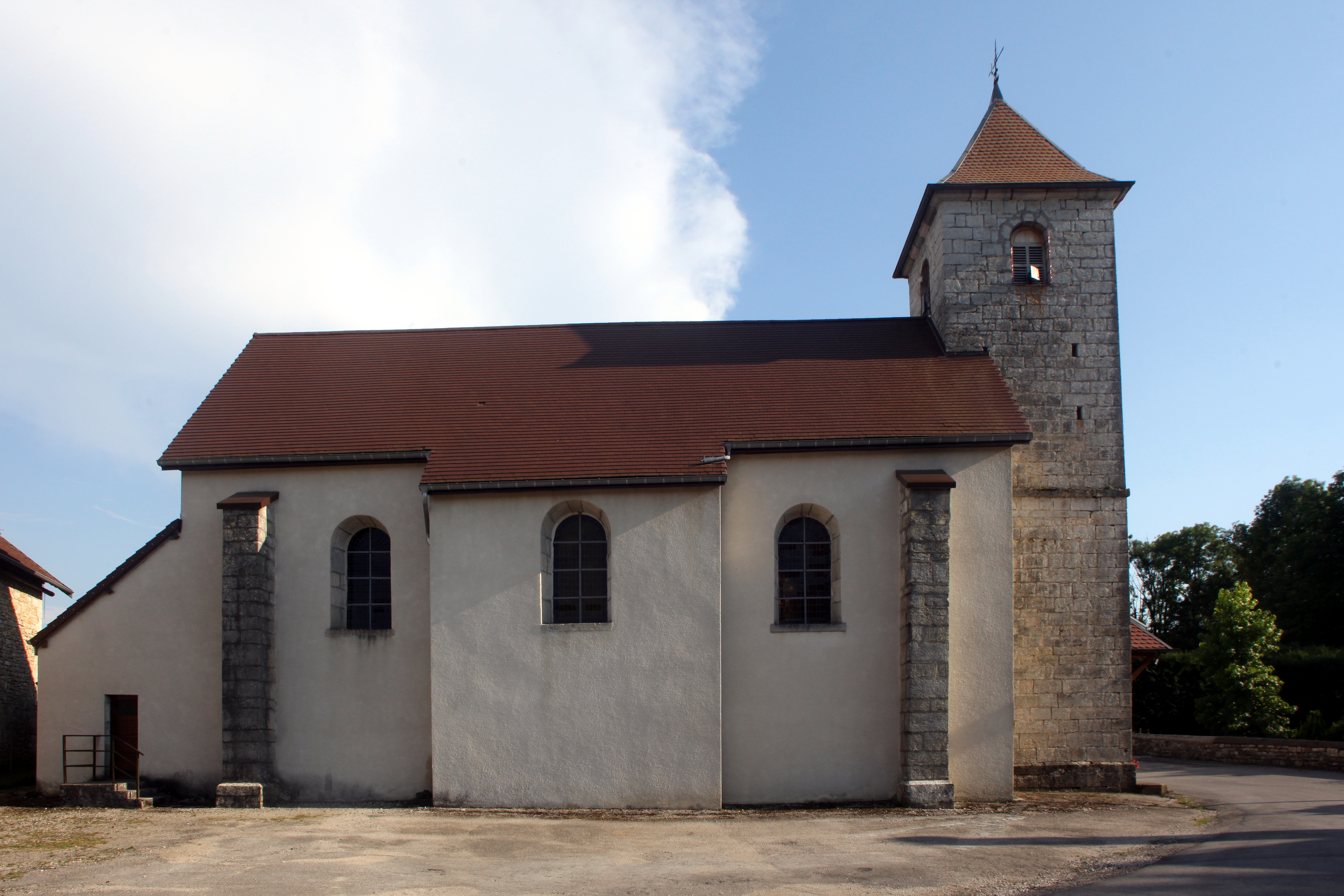 Église de Charbonnières-les-Sapins (Doubs).